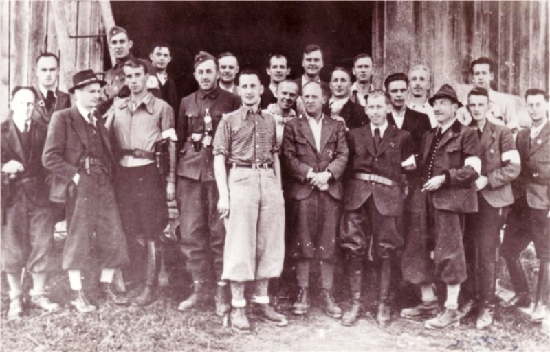 Celjski kulturbundovci in gestapovci